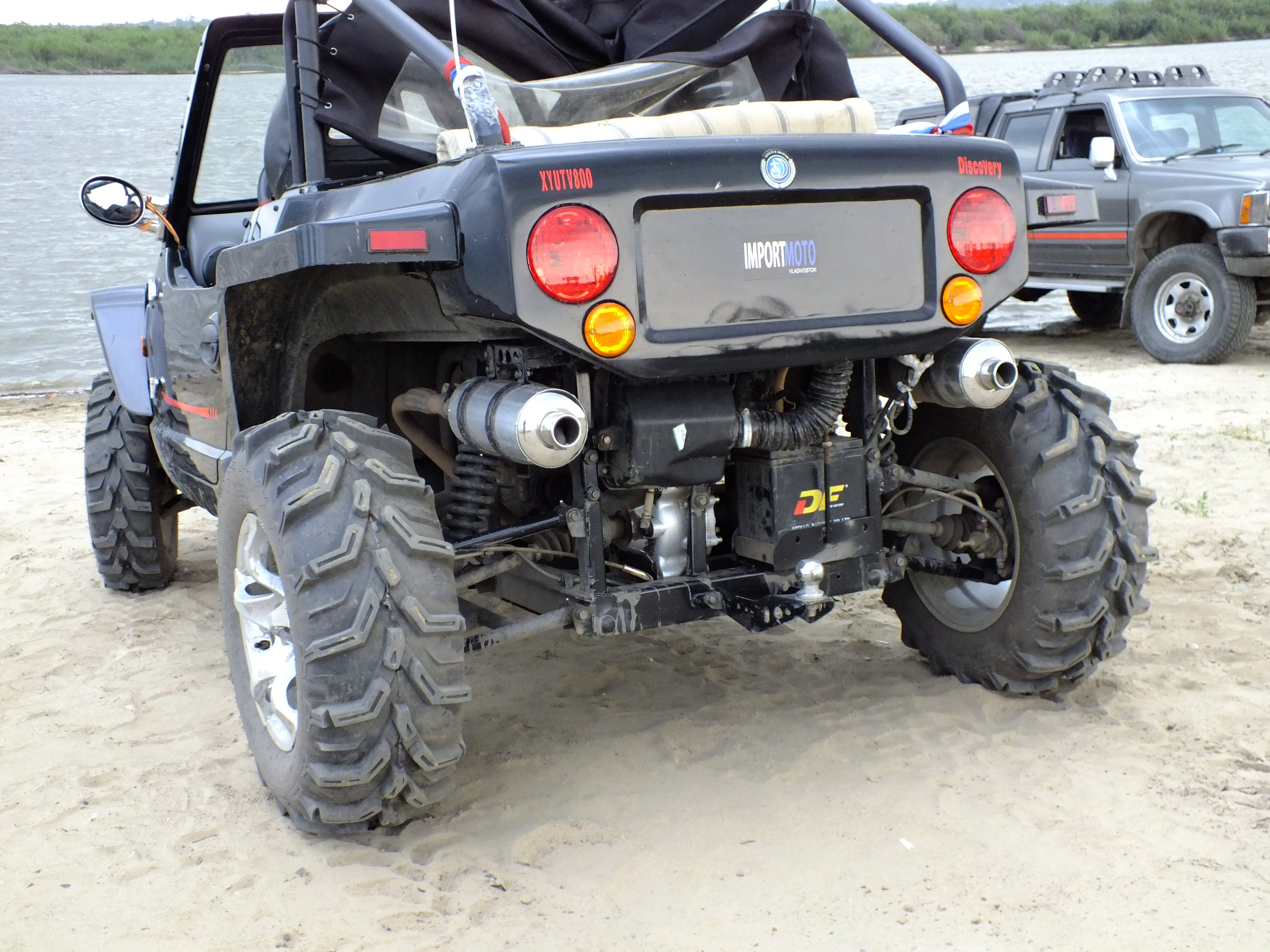 Side-by-side в Хабаровске